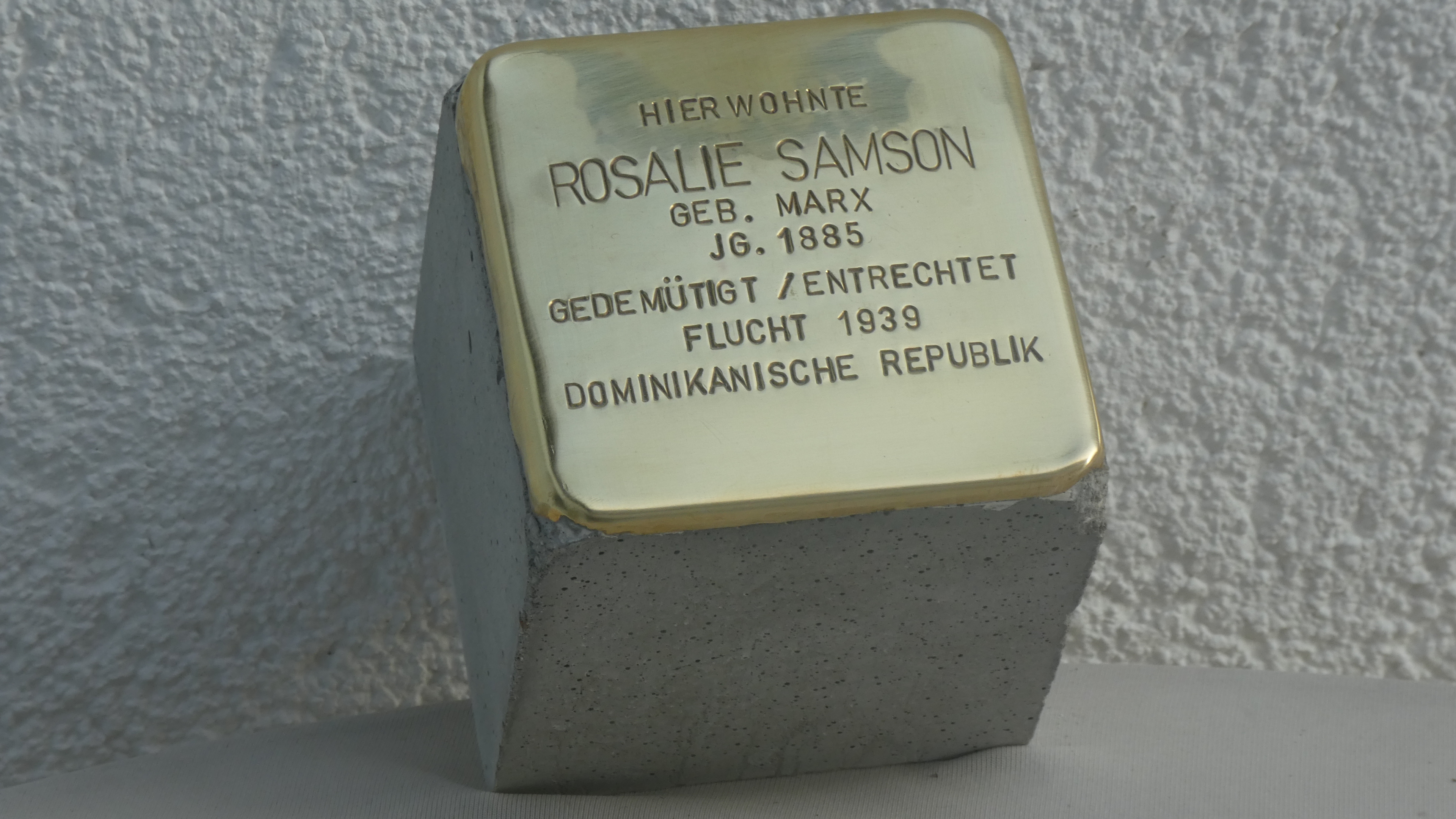 Rosalie Samson geb. Marx, Cappenberger Str. 7, 44532 Lünen